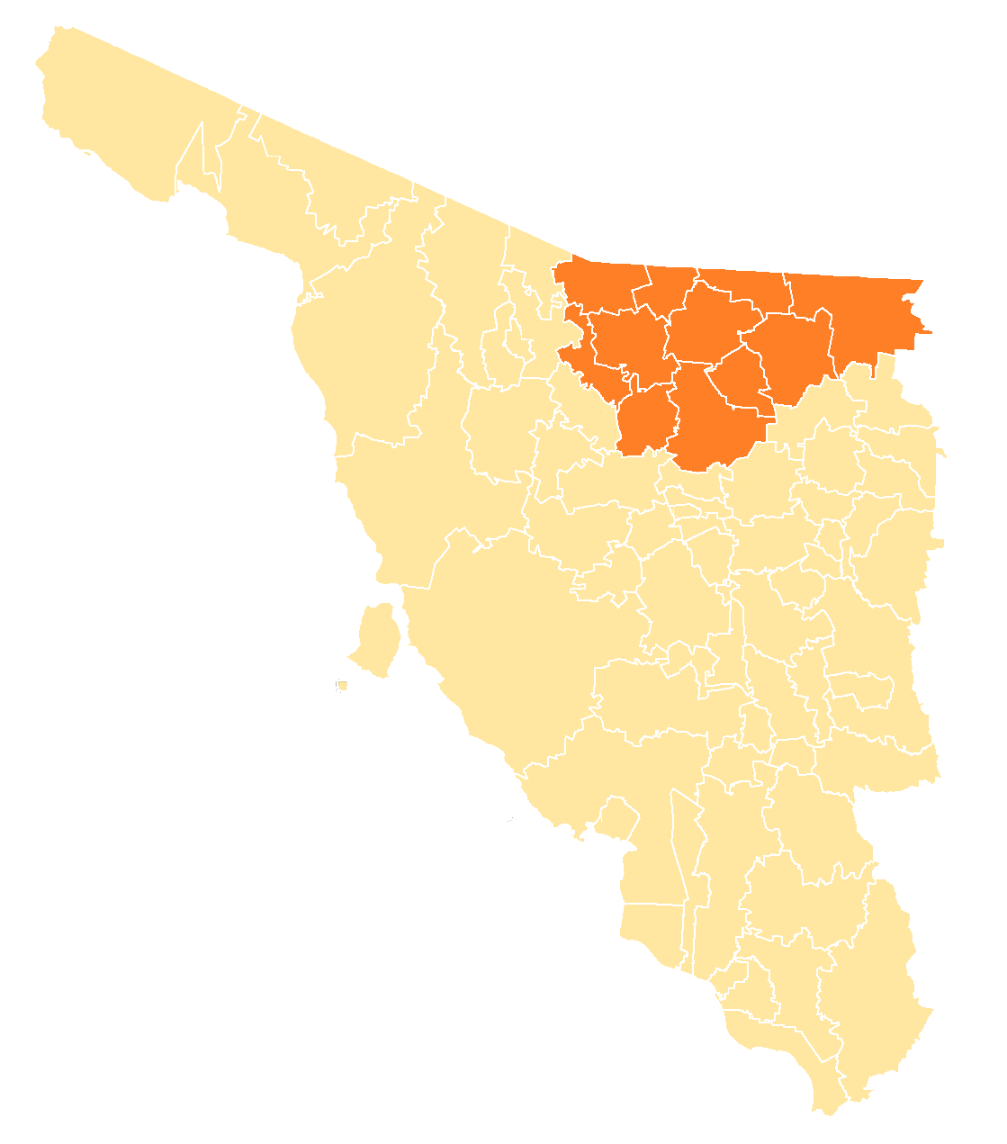 Mapa del Distrito Electoral Federal de Sonora 2